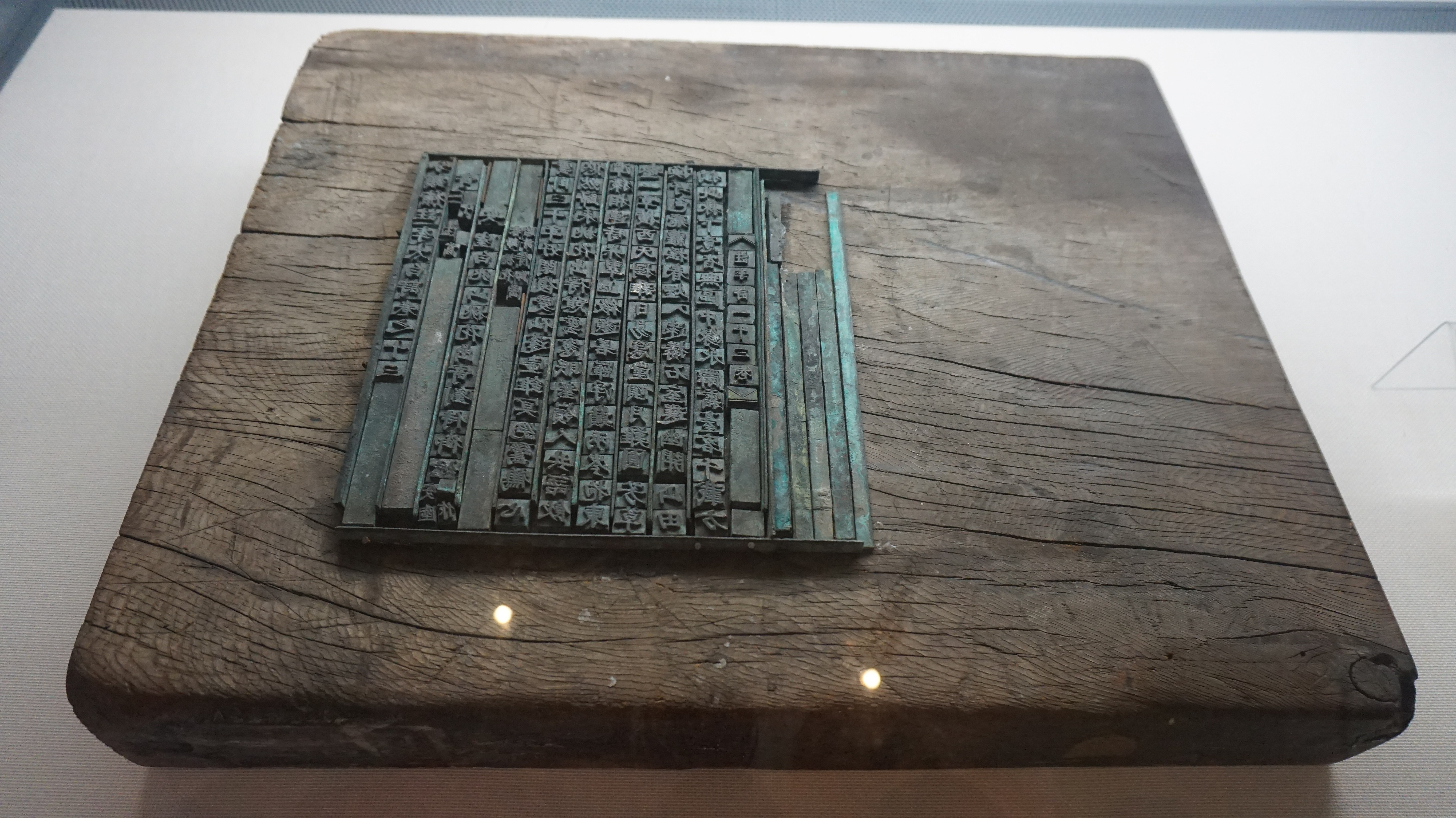 갑인자 (3)